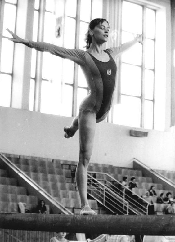 Angelika Hellmann ADN-ZB Koard 20-6-74 Berlin: 26. DDR-Meisterschaften im Turnen - Nach den Pflichtübungen bei den 26. DDR-Turnmeisterschaften nehmen die beiden Titelverteidiger die führenden Positionen ein. Angelika Hellmanns Übung am Schwebebalken wurde mit 9,30 Punkten bewertet. Sie setzte sich mit insgesamt 37,45 Punkten vor Ricarda Schmeißer an die Spitze.